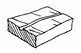 Oberflächenfehler Riefe